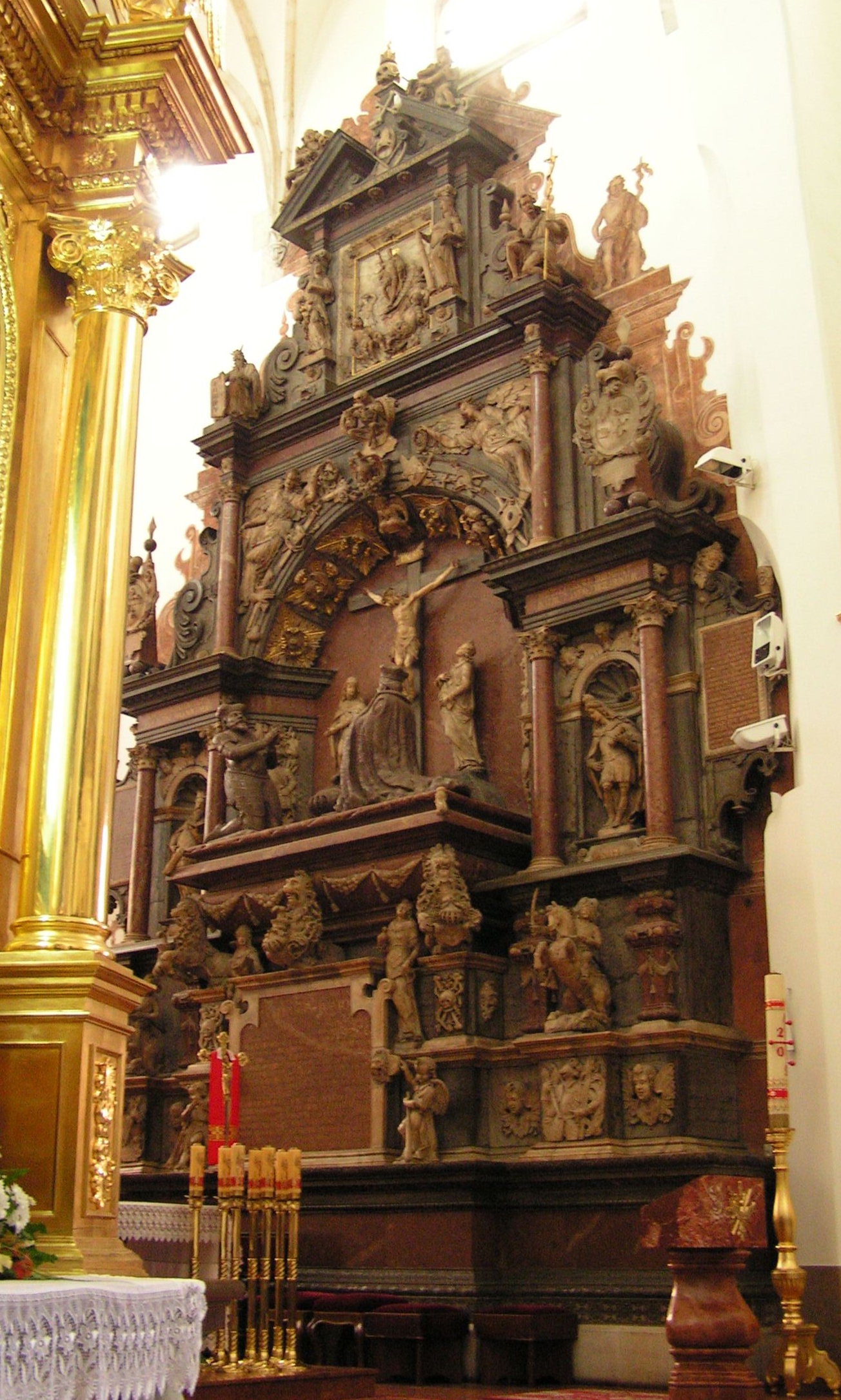 Nagrobek Ostrogskich. Katedra w Tarnowie. Początek XVII wieku